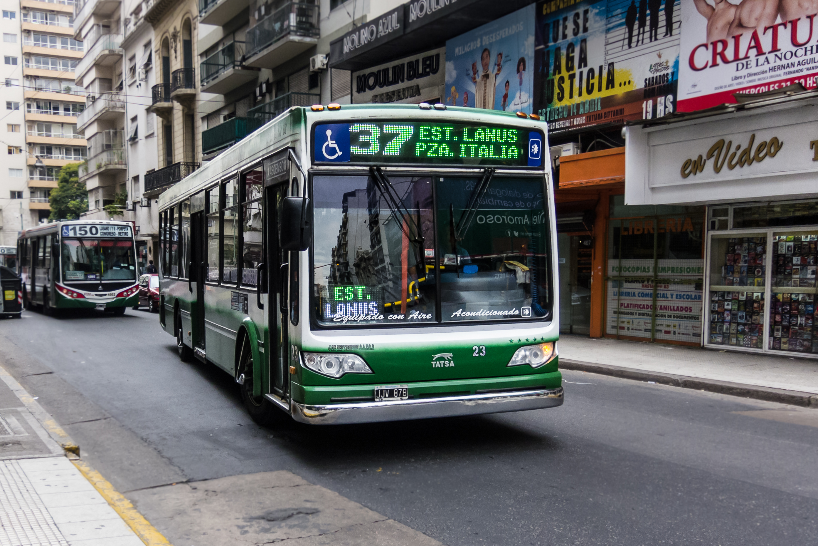 Colectivo de la Línea 37, interno 23, carrocería TATSA Puma D12, chasis , matrícula JJV878. Buenos Aires, Argentina.